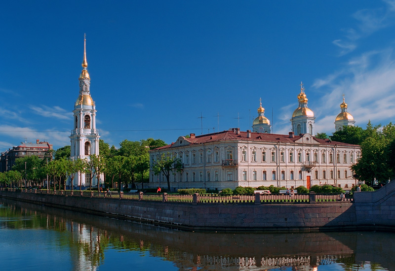 Собор Николо-Богоявленский (Морской) (Санкт-Петербург, Никольская площадь, 1/3)